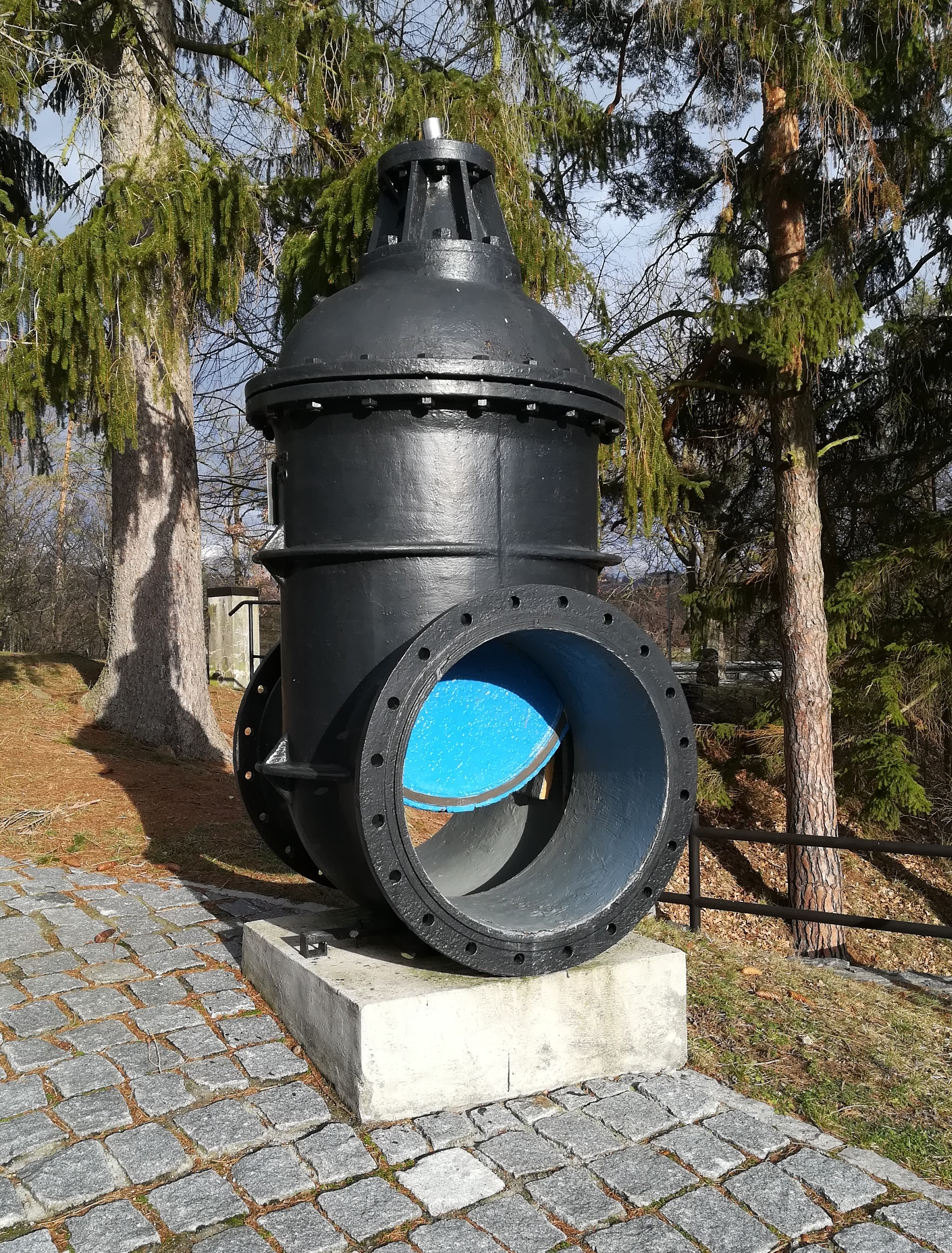 Pařížov (Běstvina) - přehrada Pařížov, původní šoupátko DN800 z roku 1912.